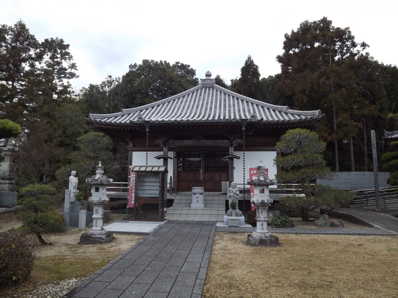 明王院の不動堂